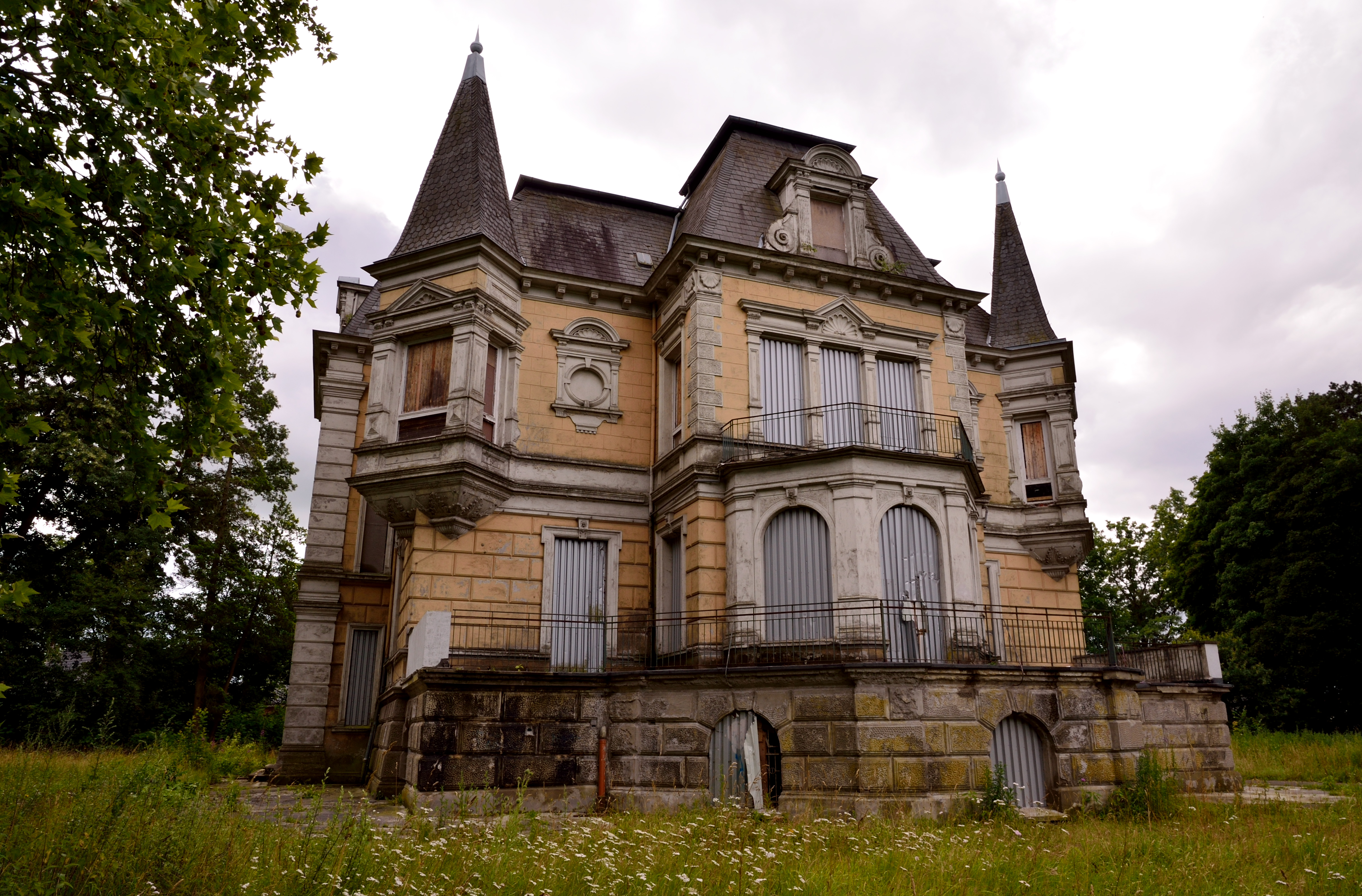 Villa Nordstern in Lehrte